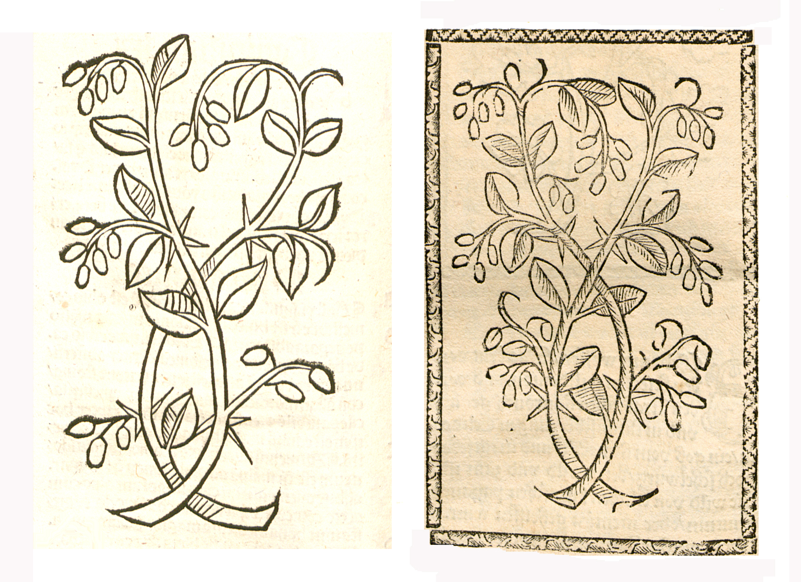 Abbildung von Surrouch (Berberis vulgaris)